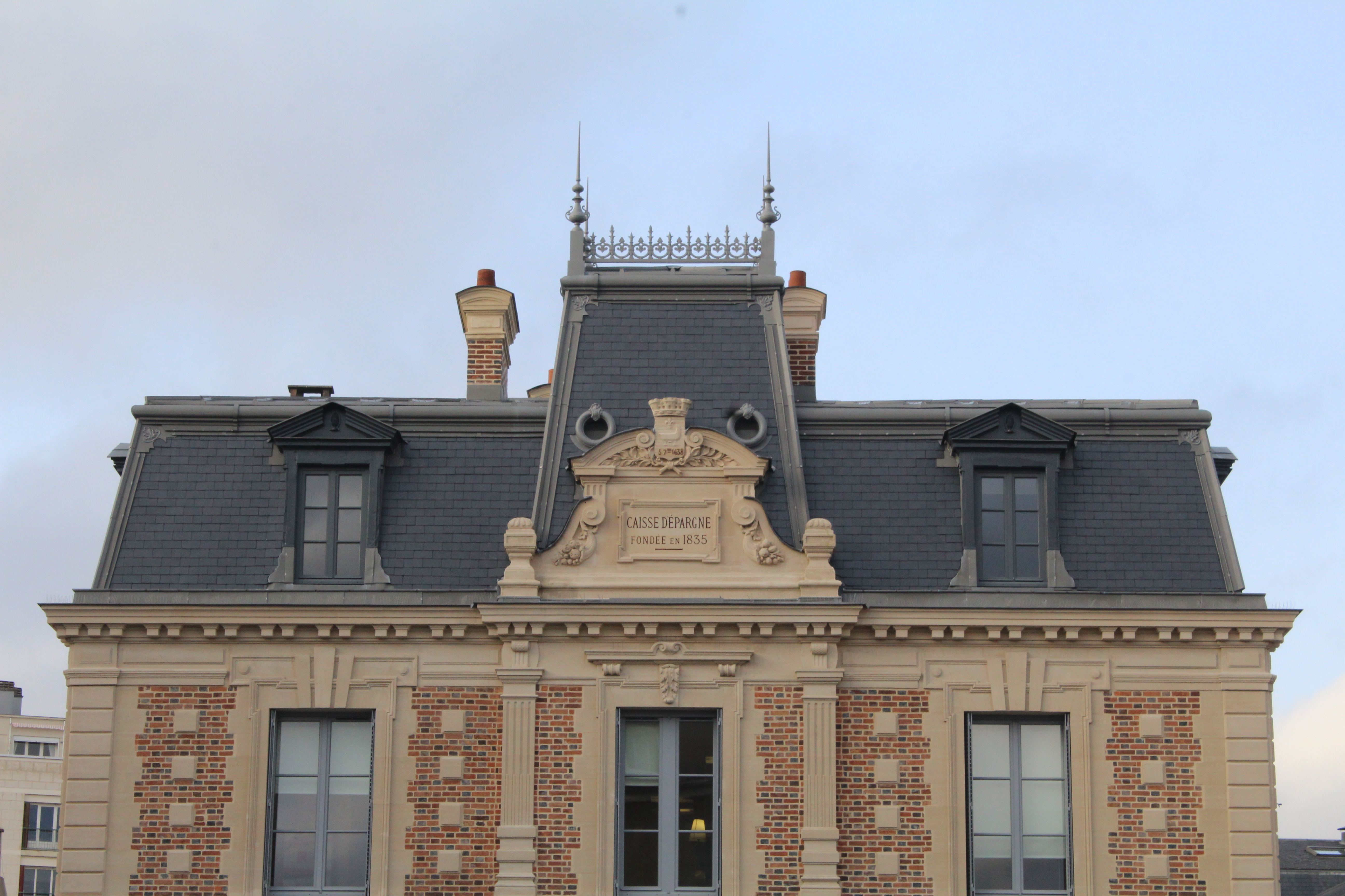 Caisse d'Épargne de Saint-Germain-en-Laye.